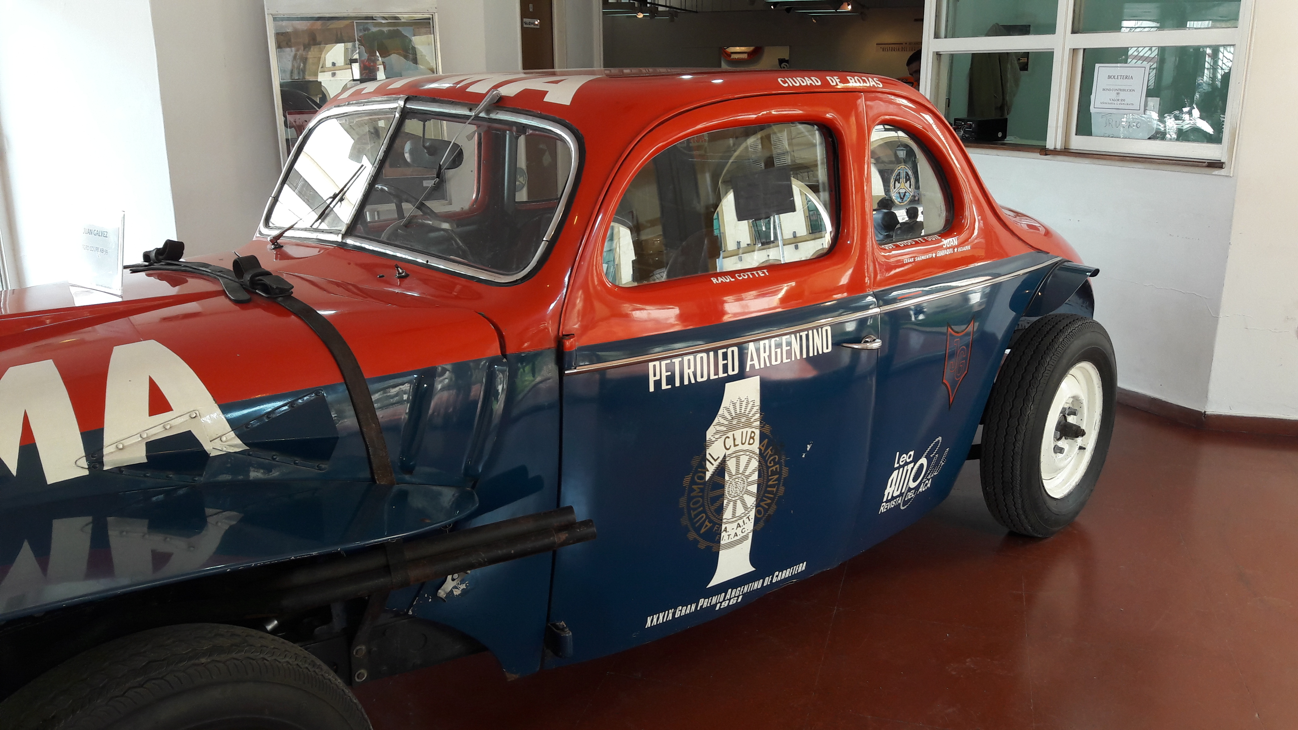 Ford Coupe AB 59 - Juan Gálvez. Expo Autos, Museo de Bellas Artes de Luján.